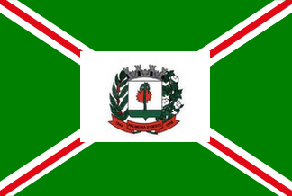 Bandeira de Palmeira d'Oeste - SP - Brasil.